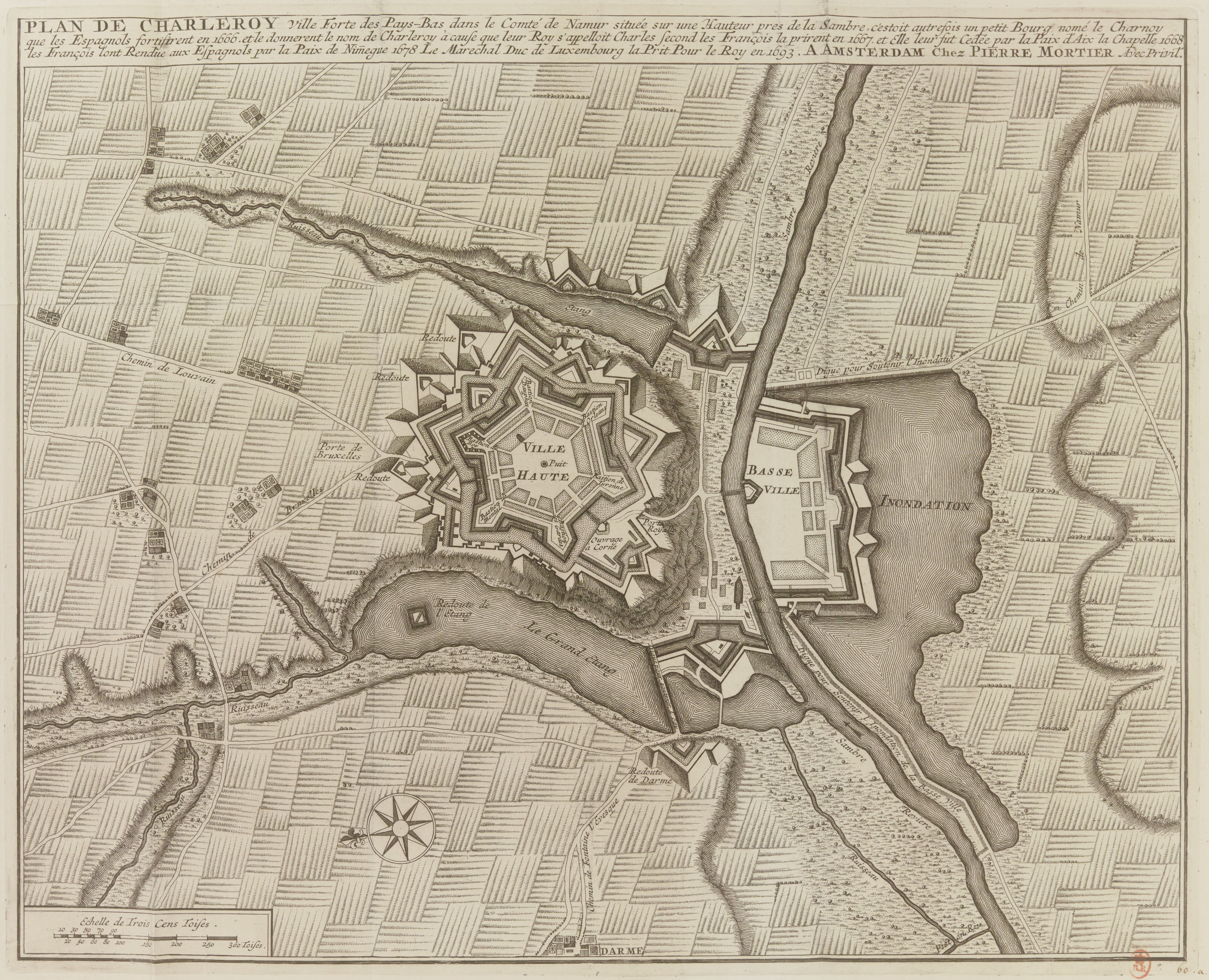 Plan de Charleroi, actuellement dans le Hainaut en Belgique. 1693. Légende : PLAN DE CHARLEROY. Ville Forte des Pays-Bas dans le Comté de Namur située sur une Hauteur pres de la Sambre. c'estoit autrefois un petit Bourg nomé le Charnoy que les Espagnols forifiront en 1666 et le donneront le nom de Charleroy à cause que leur Roy s'appelloit Charles second. les François la prirent en 1667 et Elle leur fut Cédée par la Paix d'Aix la Chapelle 1668 les Francois lont Rendue aux Espagnols par la Paix de Nimegue 1678 Le Marechal Duc de Luxembourg la Prit Pour le Roy en 1693. A AMSTERDAM Chez Pierre MORTIER. C'est cette gravure (ou son original ou copie) et sa légende qui servirent de source pour le plan gravé sur le mur arrière de l'agence de la Banque Nationale de Belgique à Charleroi. La banque était située quai du Brabant, la façade arrière rue Léopold, face à la rue Puissant. L'agence a été rachetée fin 2005 par la Ville avec la collaboration de la Communauté française de Belgique.